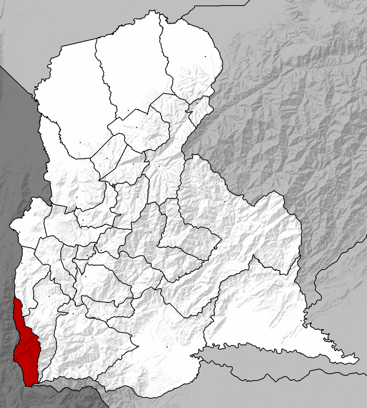 Municipio Rafael Urdaneta - Táchira